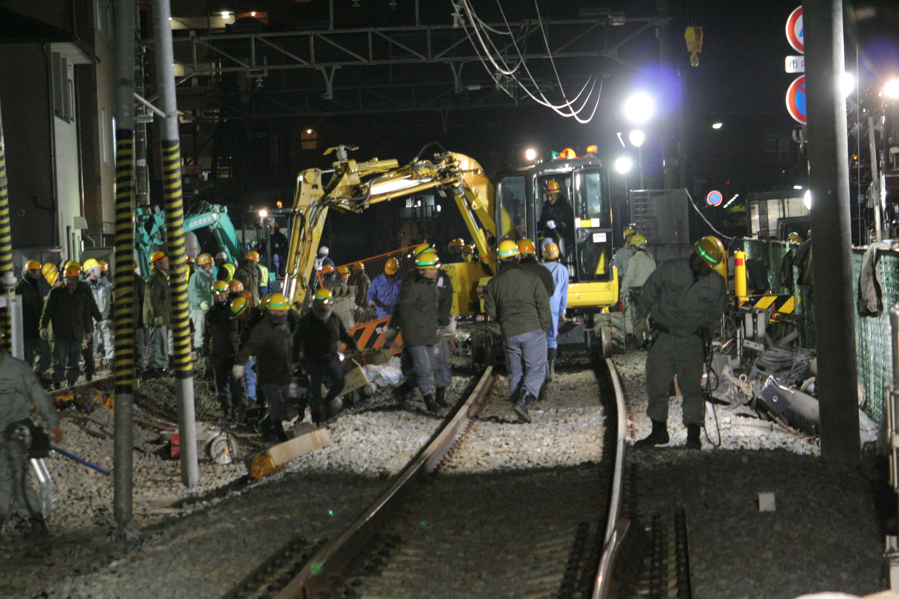 2013年2月12日。日本国兵庫県高砂市山陽電鉄本線荒井駅西側にて発生した特急列車脱線事故の写真。